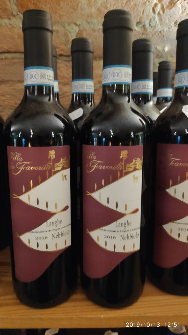 Nebbiolo 2016 - La Favorita